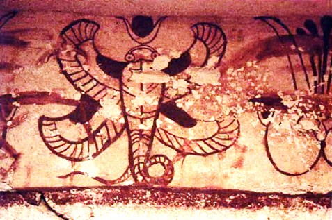 Cagliari, necropoli di età punica di Tuvixeddu - tomba dell'Ureo